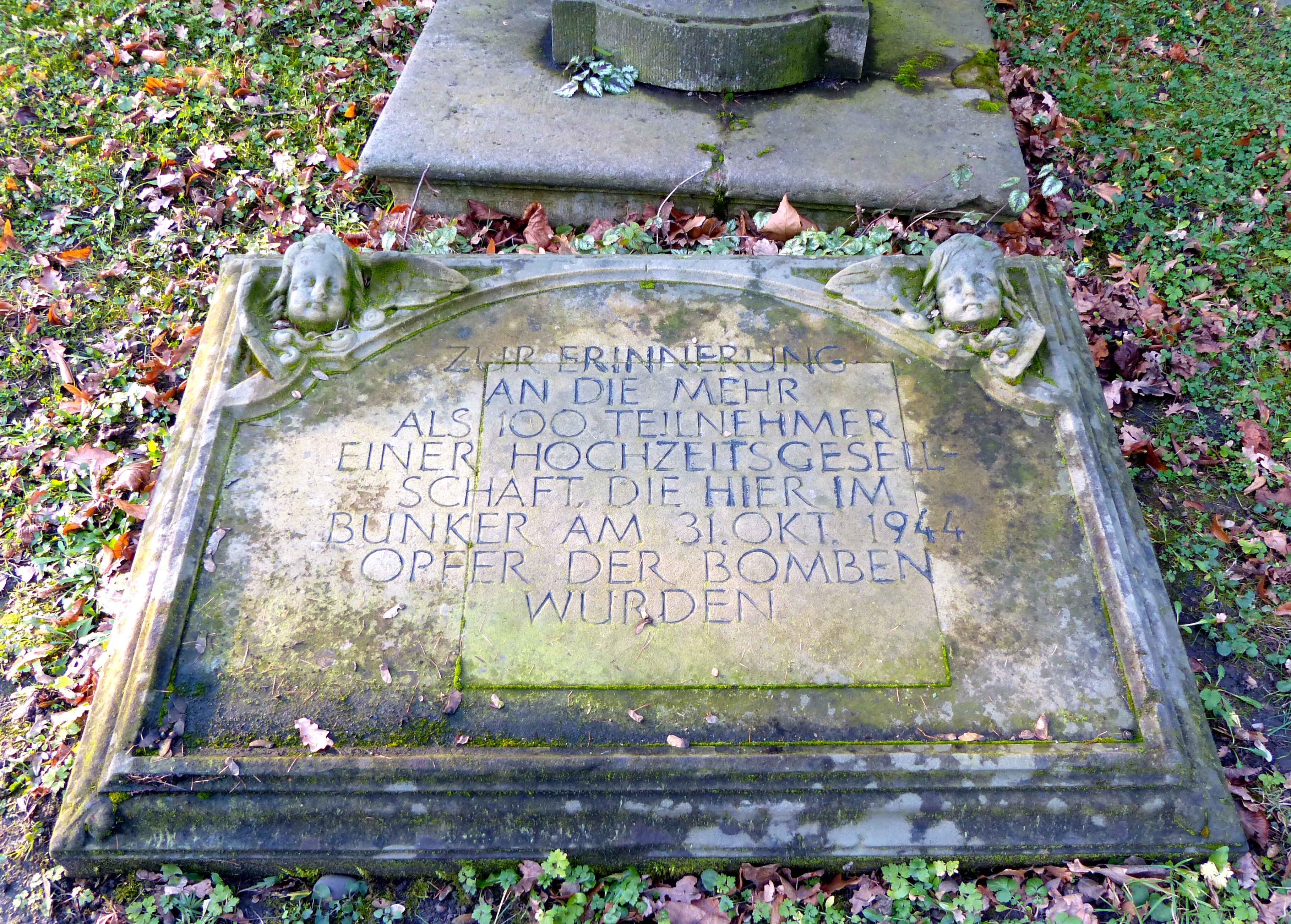 Grabstelle auf dem Melaten-Friedhof: Plakette für 100 Bombenopfer, die in einem Bunker bei einem Bombenangriff 1944 getötet wurden